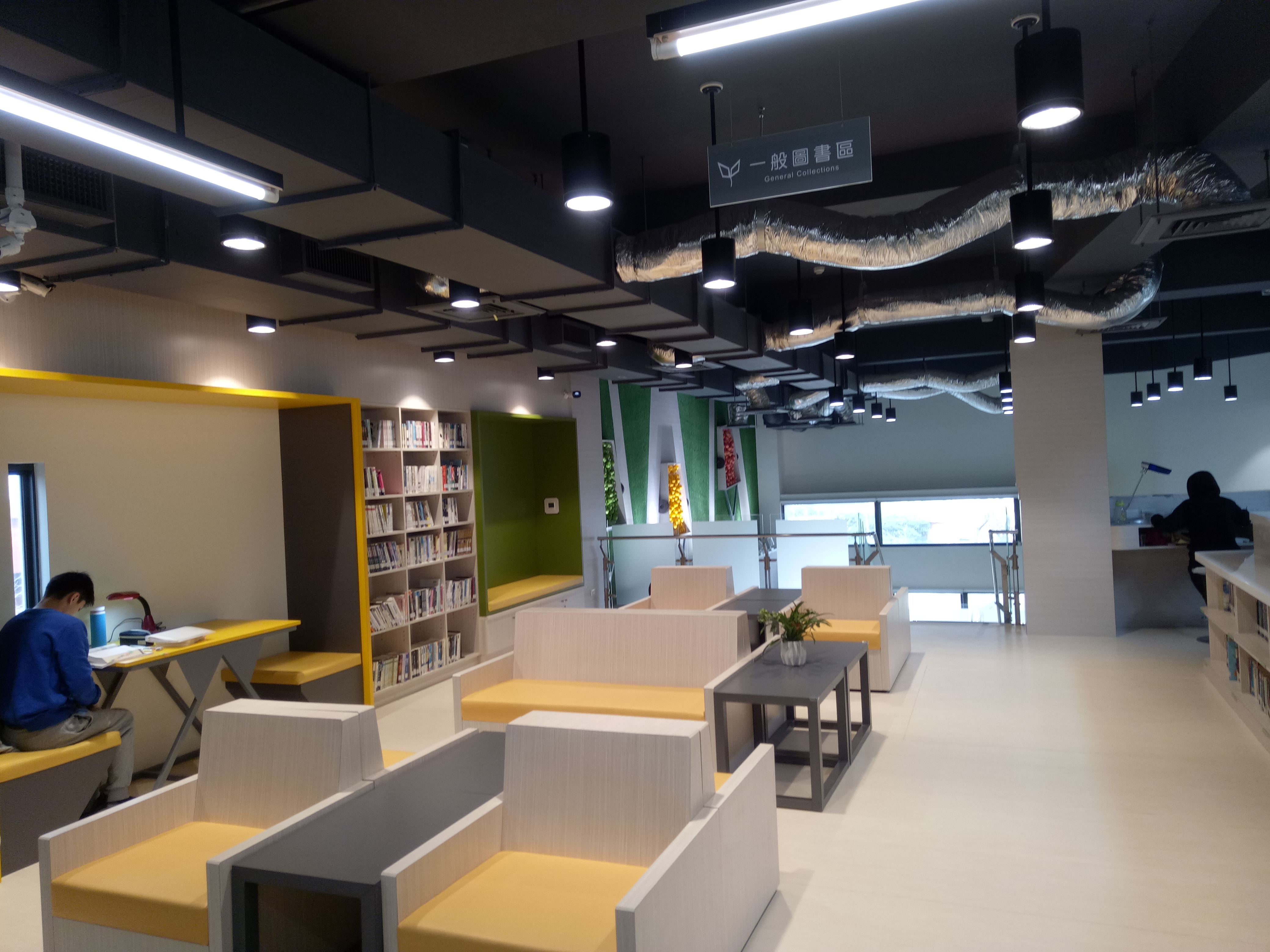 桃園市立圖書館新坡分館內部。